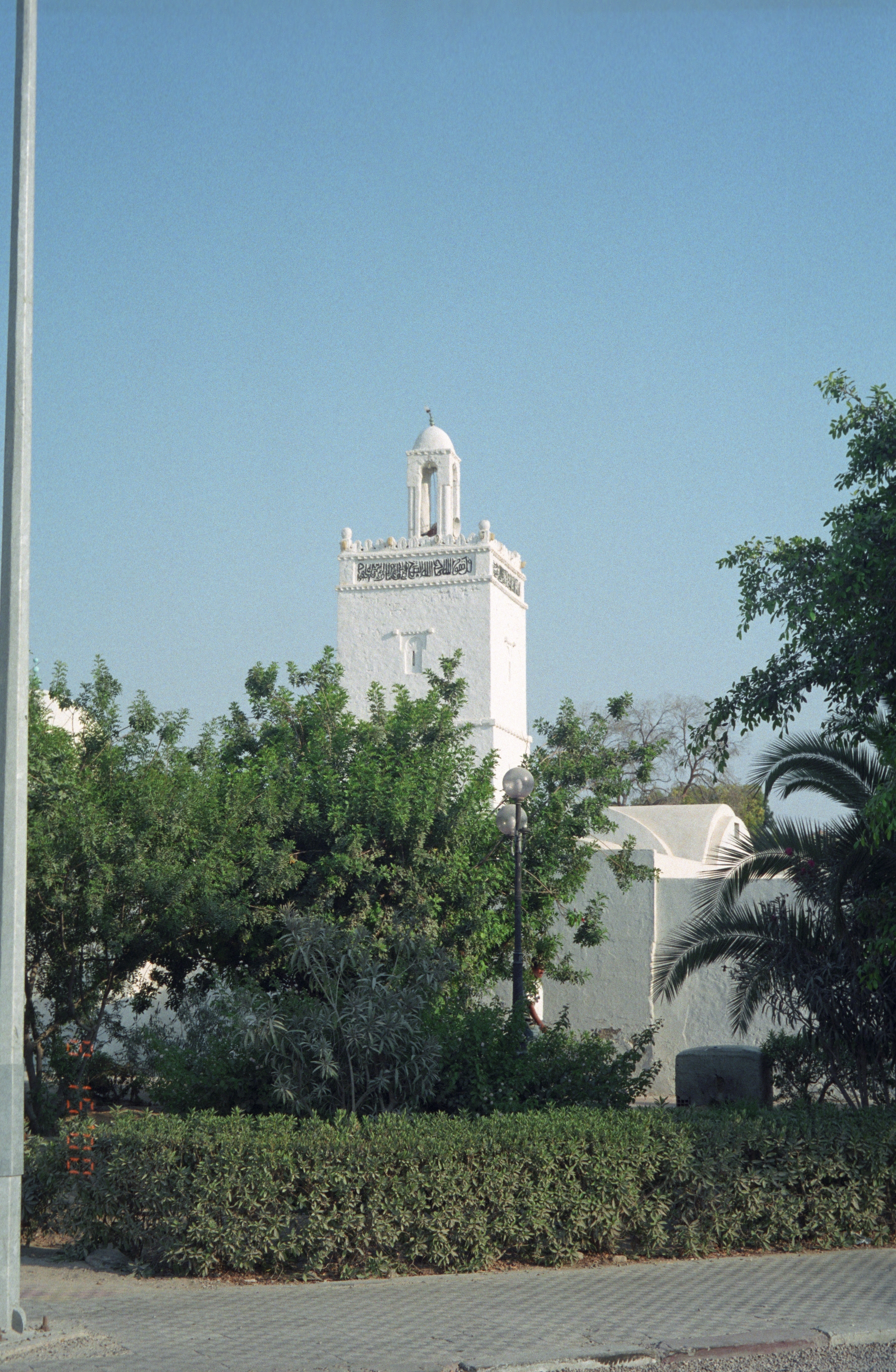 A mosque minaret in Houmt Souk, Djerba, Tunisia.